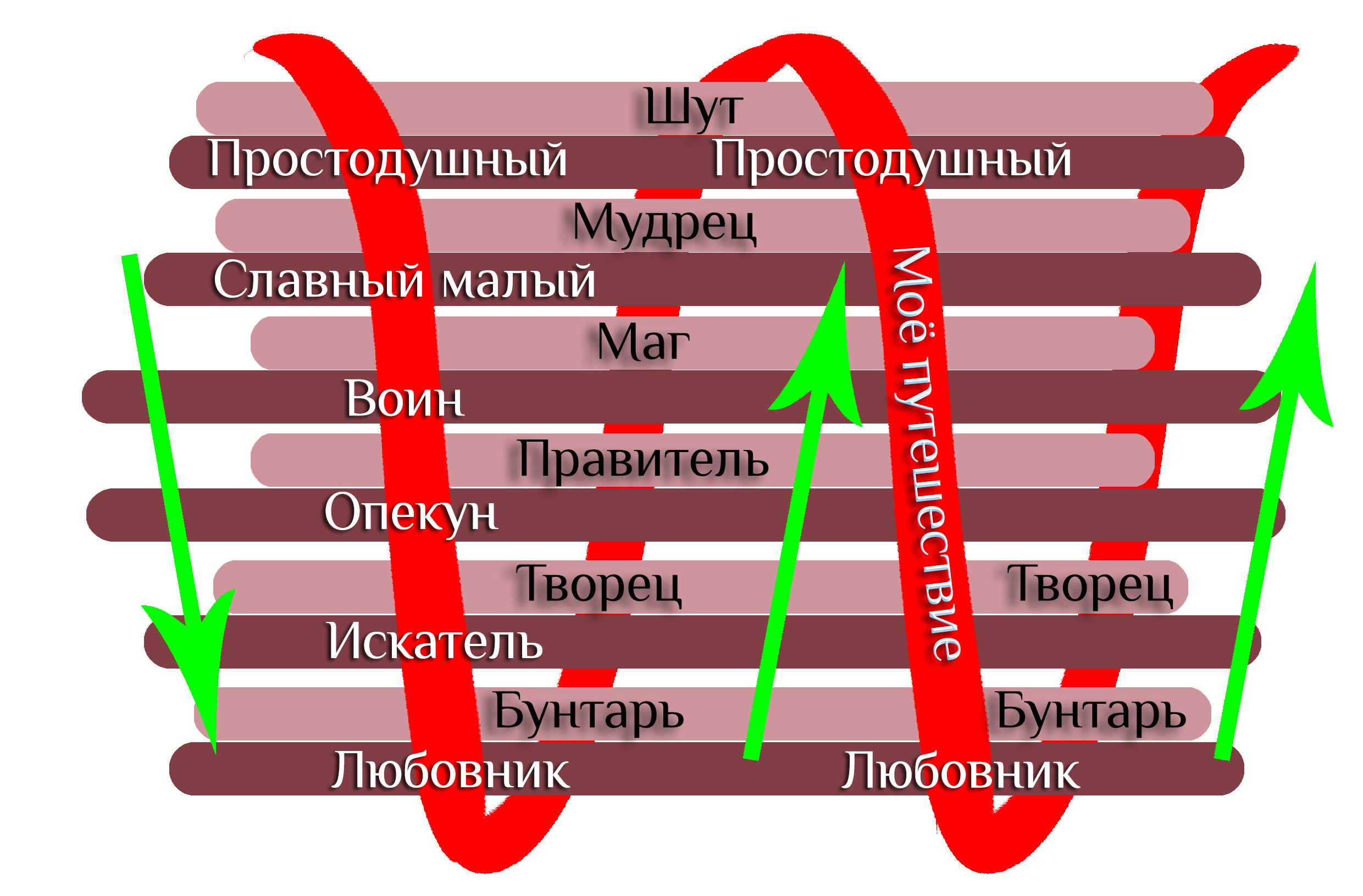 Путешествие героя согласно Pearson C., Marr H. What story are you living? A workbook and guide to interpreting results from the PMAI instrument. — 1st ed. — Гейнсвилл: Center for Applications of Psychological Type, 2007. — 163 p. — ISBN 978-0-935652-78-9. — P. 17.